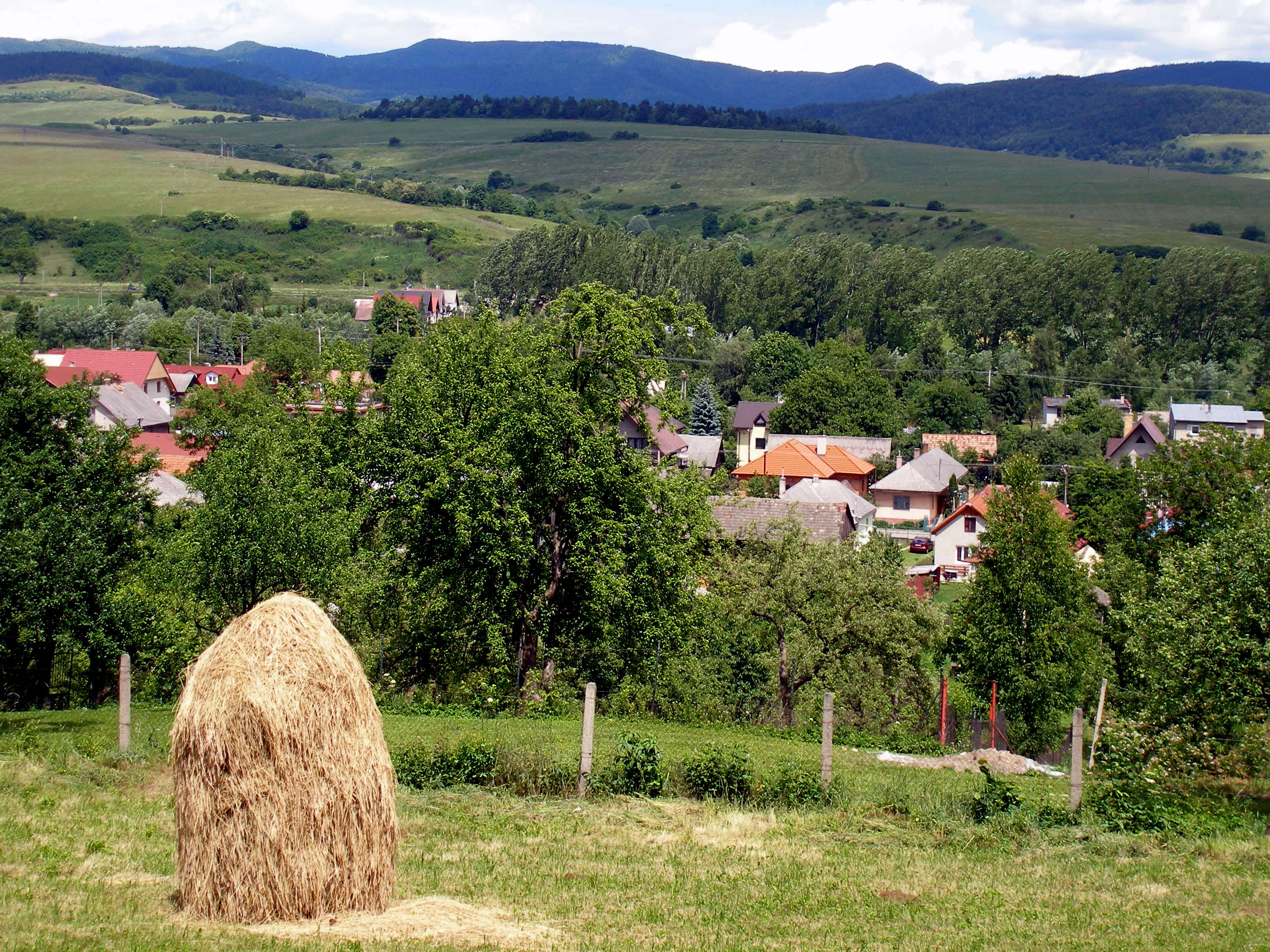 Obec Rožkovany okres Sabinov